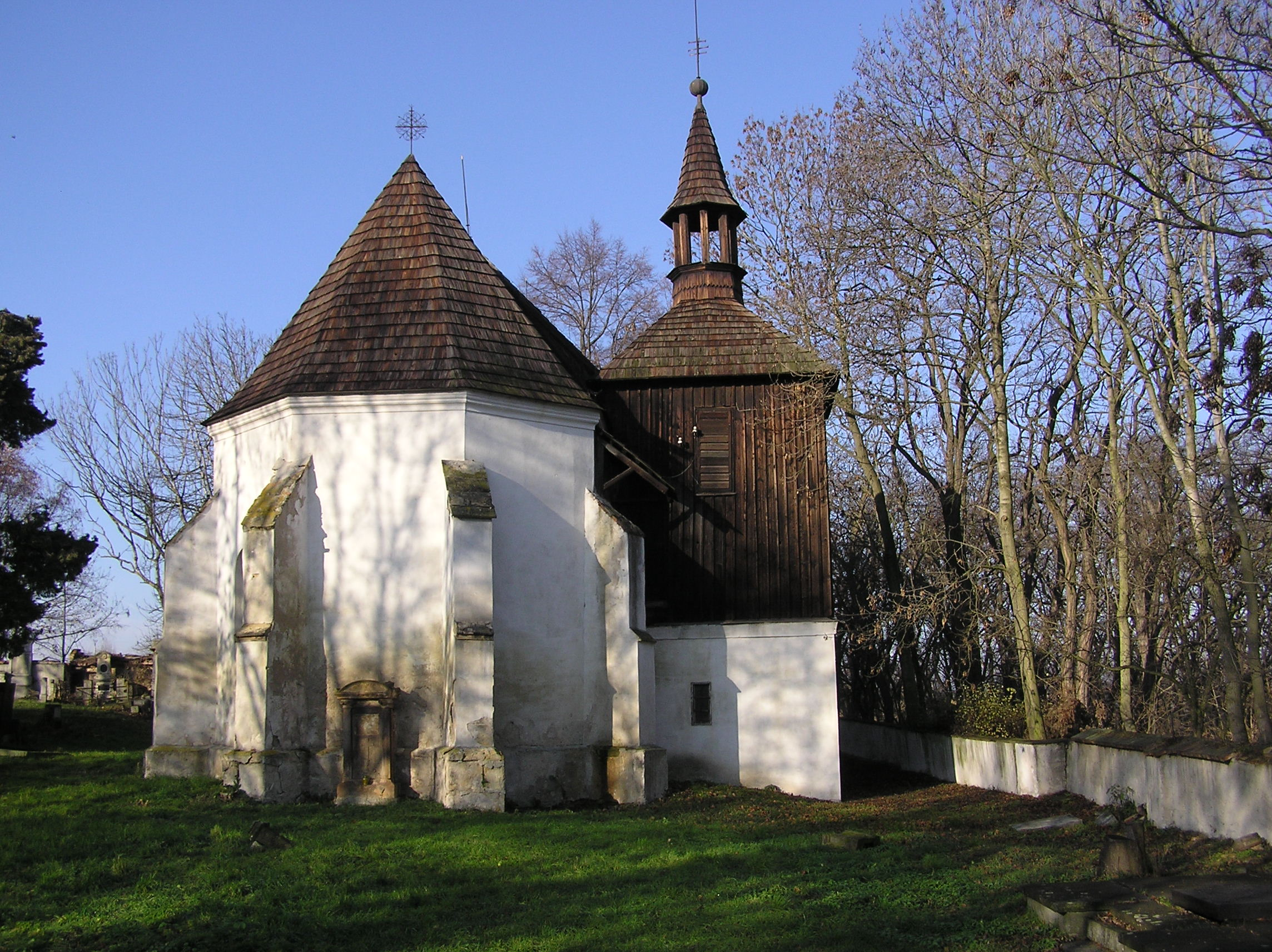 Kostel sv. Martina v Minicích